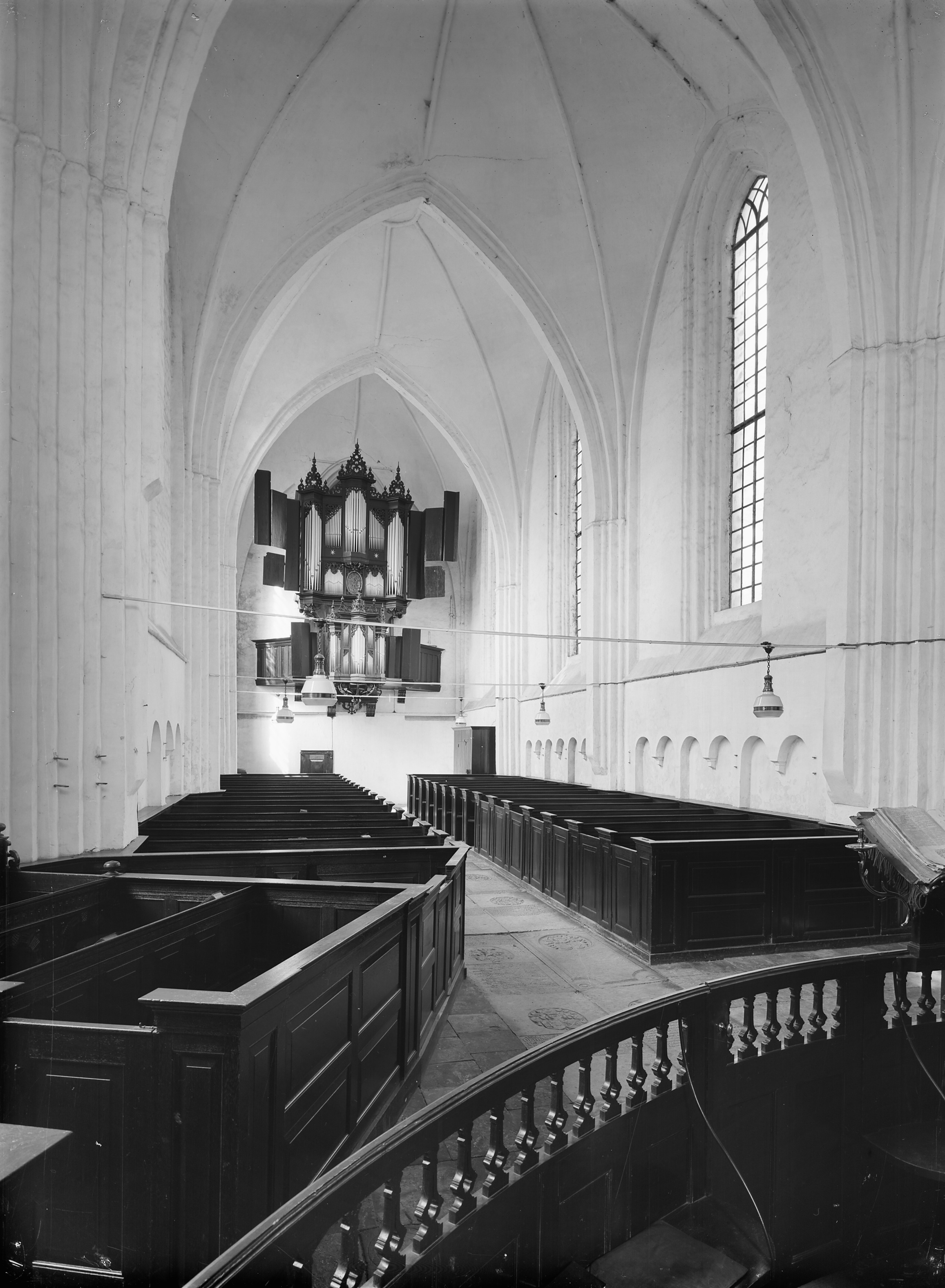 Hervormde Kerk: interieur naar het noord-westen